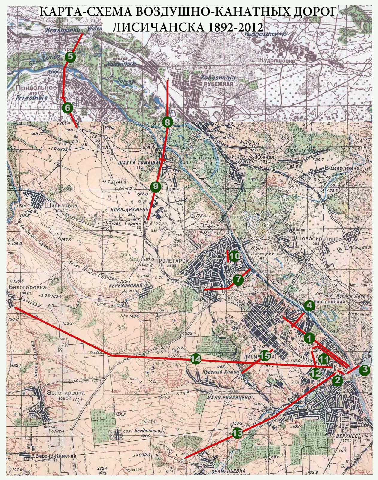 Схема Повітряно Канатних Доріг Лисичанська 1892-2012 М.Ломако